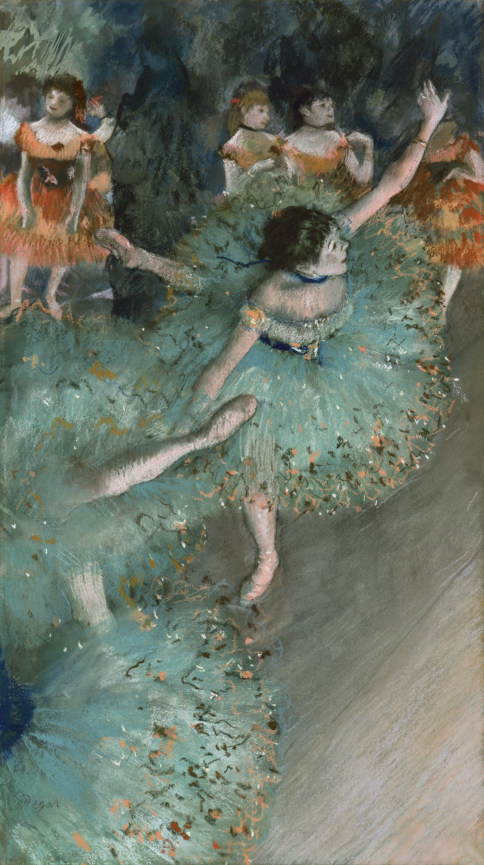 Degas nos introduce en esta pintura en el mundo del ballet que tanto le interesaba. Una vista del escenario, con varias bailarinas en plena representación, es captada desde uno de los palcos laterales en alto. Sólo una de ellas se muestra de cuerpo entero, en un complicado y rápido giro. Las demás están cortadas y el resto de sus figuras quedan a nuestra libre imaginación. Delante del decorado de paisaje, varias bailarinas de naranja esperan su turno de actuación.